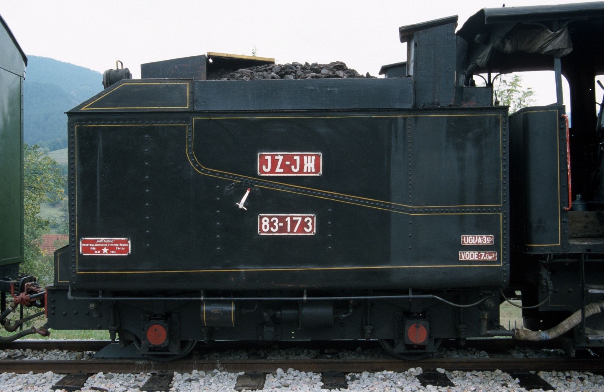 en: 4wheel tender of JDŽ 83-173 in Mokra Gora station. de: 2achsiger Tender der JDŽ 83-173 im Bahnhof Mokra Gora.